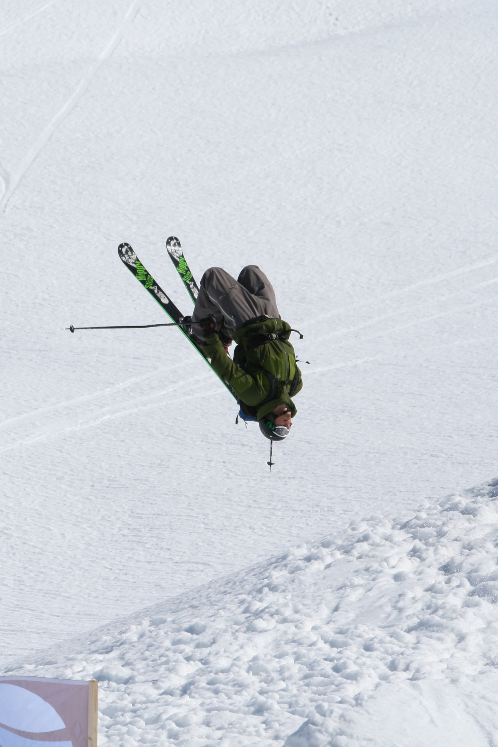 Foto: Vidar Solheim